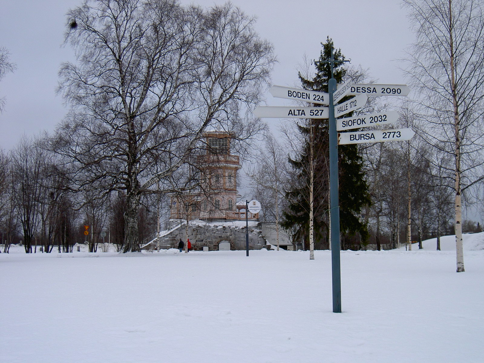 Oulu-Linnansaari Sajat digitalis kamera.--Math 2005. szeptember 12., 15:22 (CEST) hivatkozando forras: Brendel Matyas